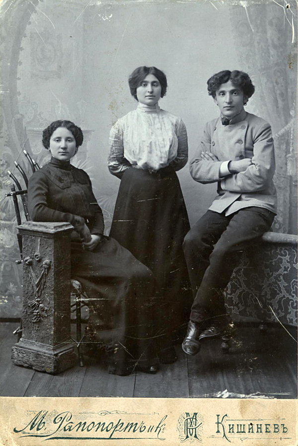 Shmil (Samuil Moiseevich) Weinberg amb la seva dona: l'actriu Sonya Weinberg (al seu costat, dreta) i la germana Adeley Weinberg (casada amb Gorfinkel), al començament dels anys 1900.